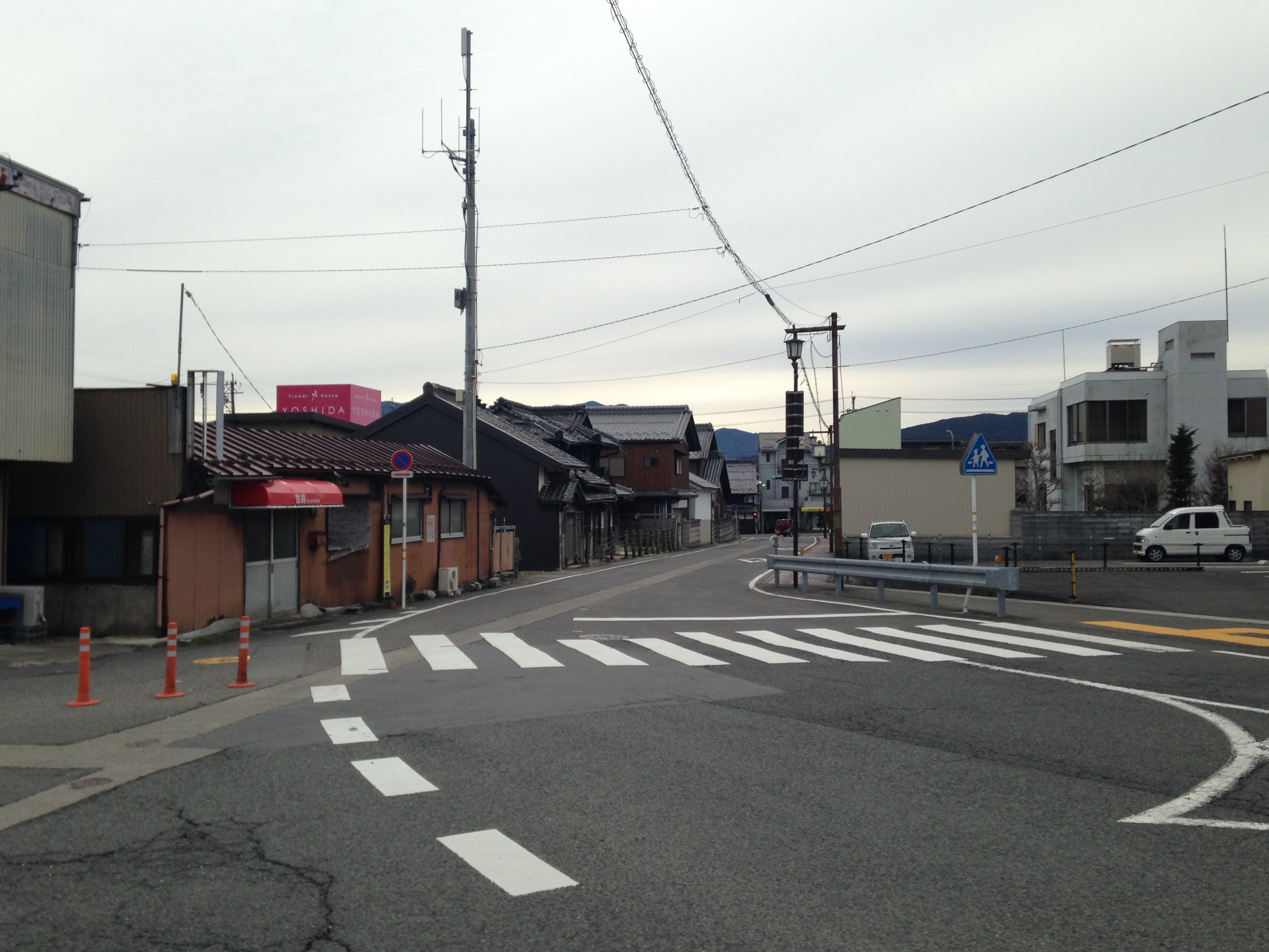 関ヶ原駅前のストリートビュー